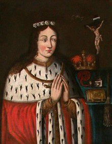 Obraz z epitafium Adelajdy Kazimierzówny (na obrazie Adelajda, córka Kazimierza Sprawiedliwego)